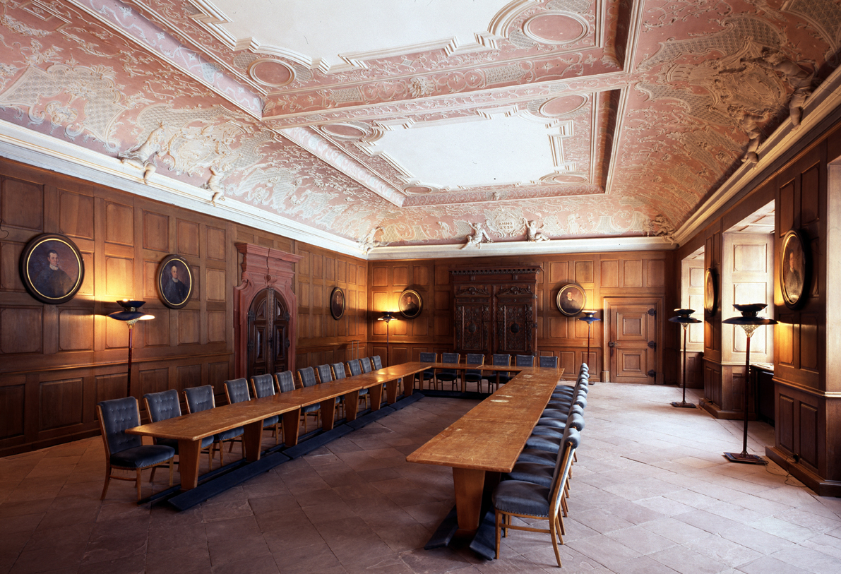 Mönchsrefektorium